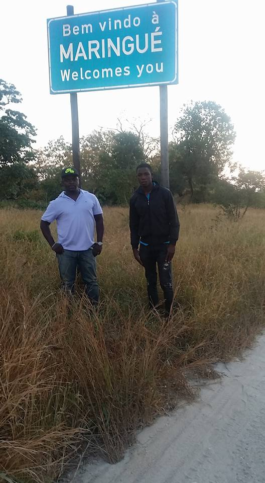 Foto em Maringué